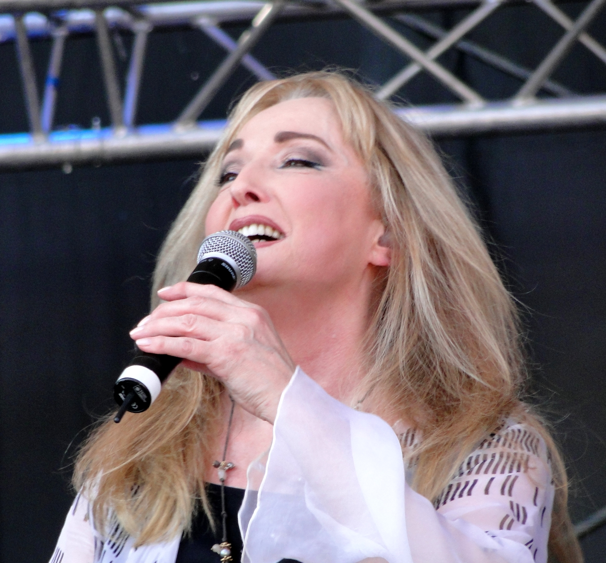 Die deutsche Sängerin Veronika Fischer während eines Auftrittes in Dresden